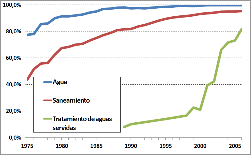 Diagrama de cobertura de agua potable y saneamiento en Chile urbano de 1975 a 2006